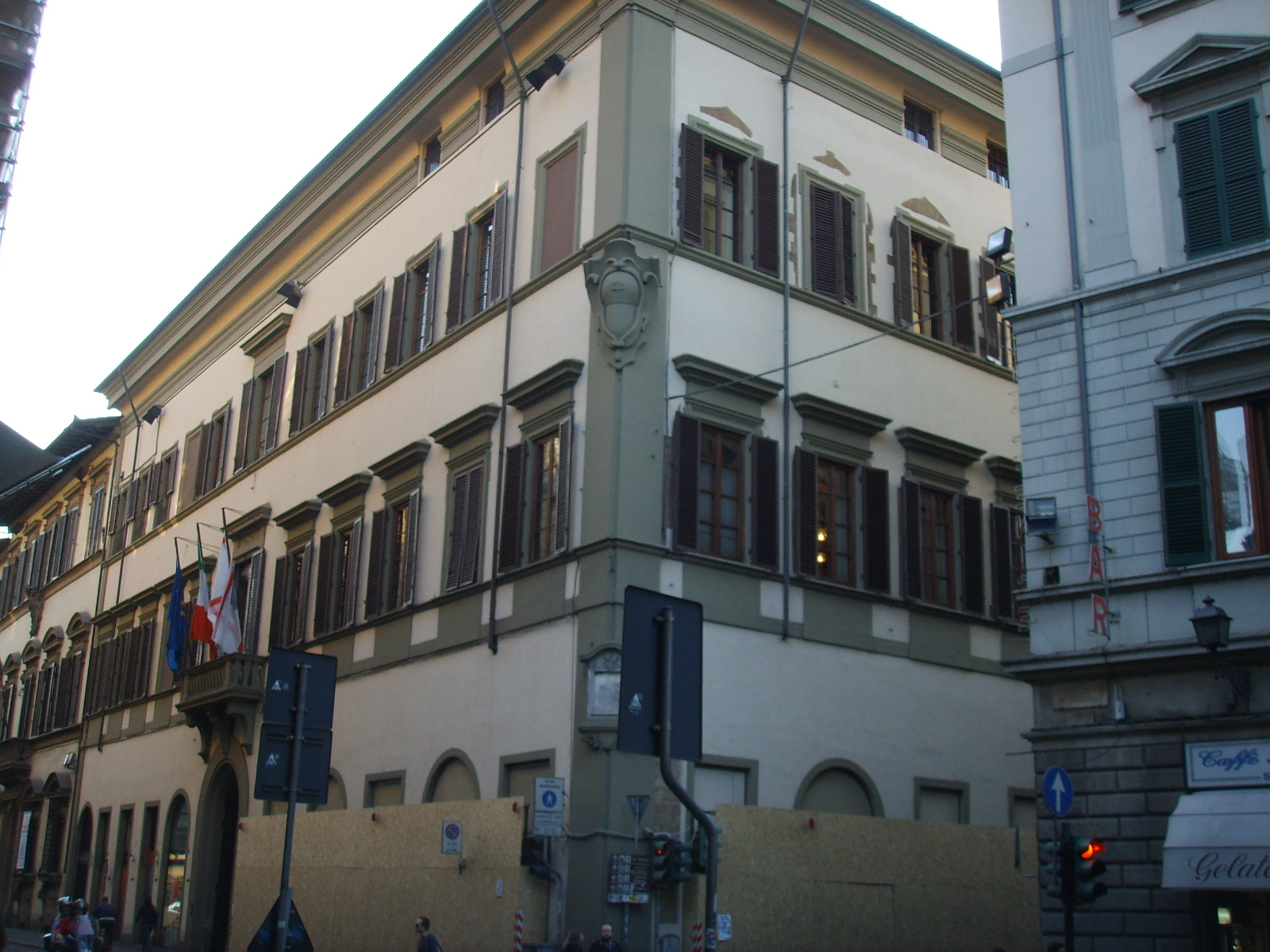 Palazzo_Panciatichi in Florence